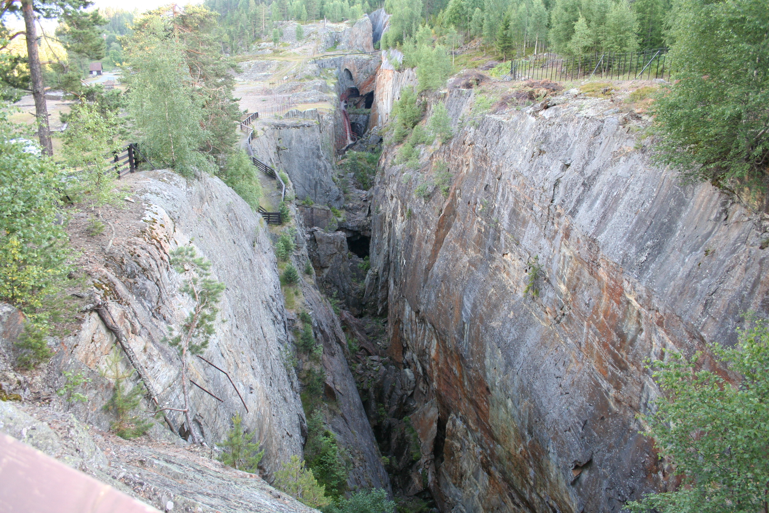 Nordgruvene - dagbrudd på Skuterudsåsen, Modum, Norge.